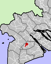 Vi Thuy District, Hau Giang Province, Vietnam.